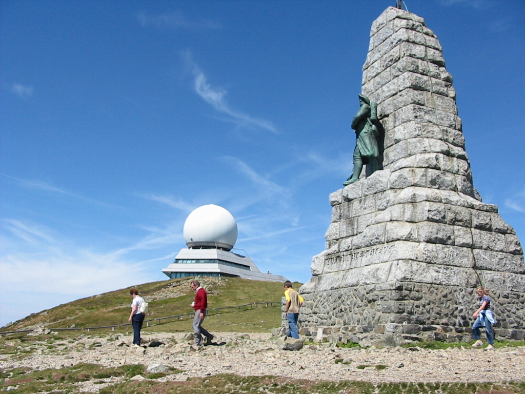 Le sommet du Grand Ballon, monument des Diables bleus et radar, massif des Vosges (France).